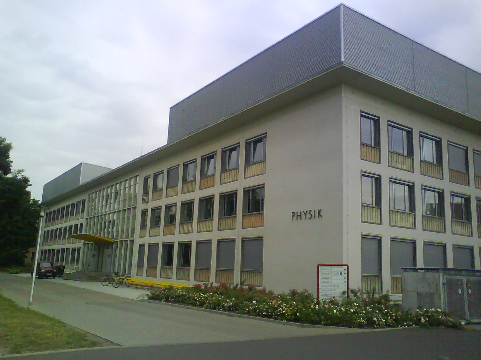 Naturwissenschaftliche Fakultät der Otto-von-Guericke-Universität Magdeburg